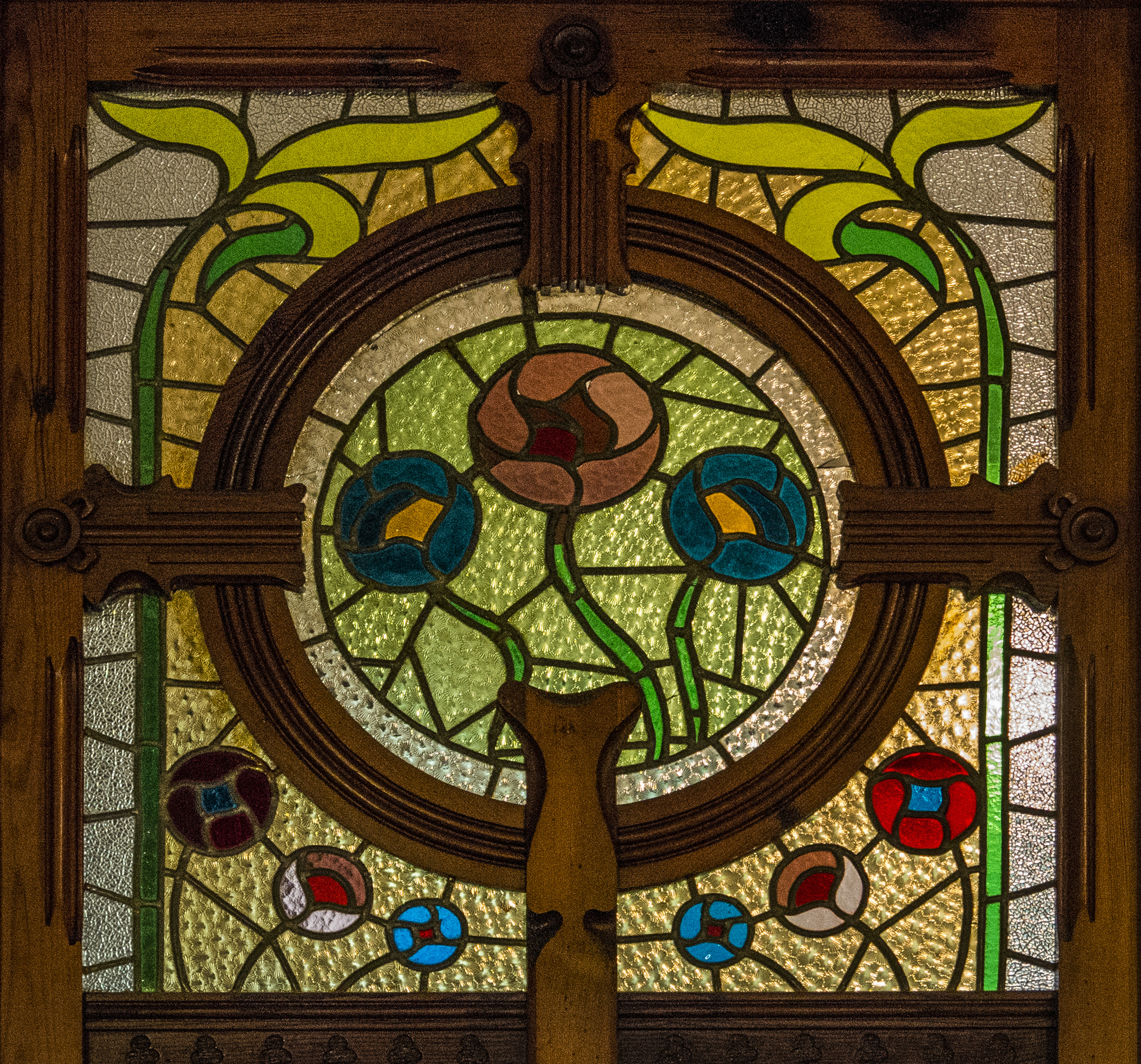 La Fira Modernista es va organitzar per l'Ajuntament de Carcaixent el cap de setmana del 10 al 12 de juny de l'any 2016.